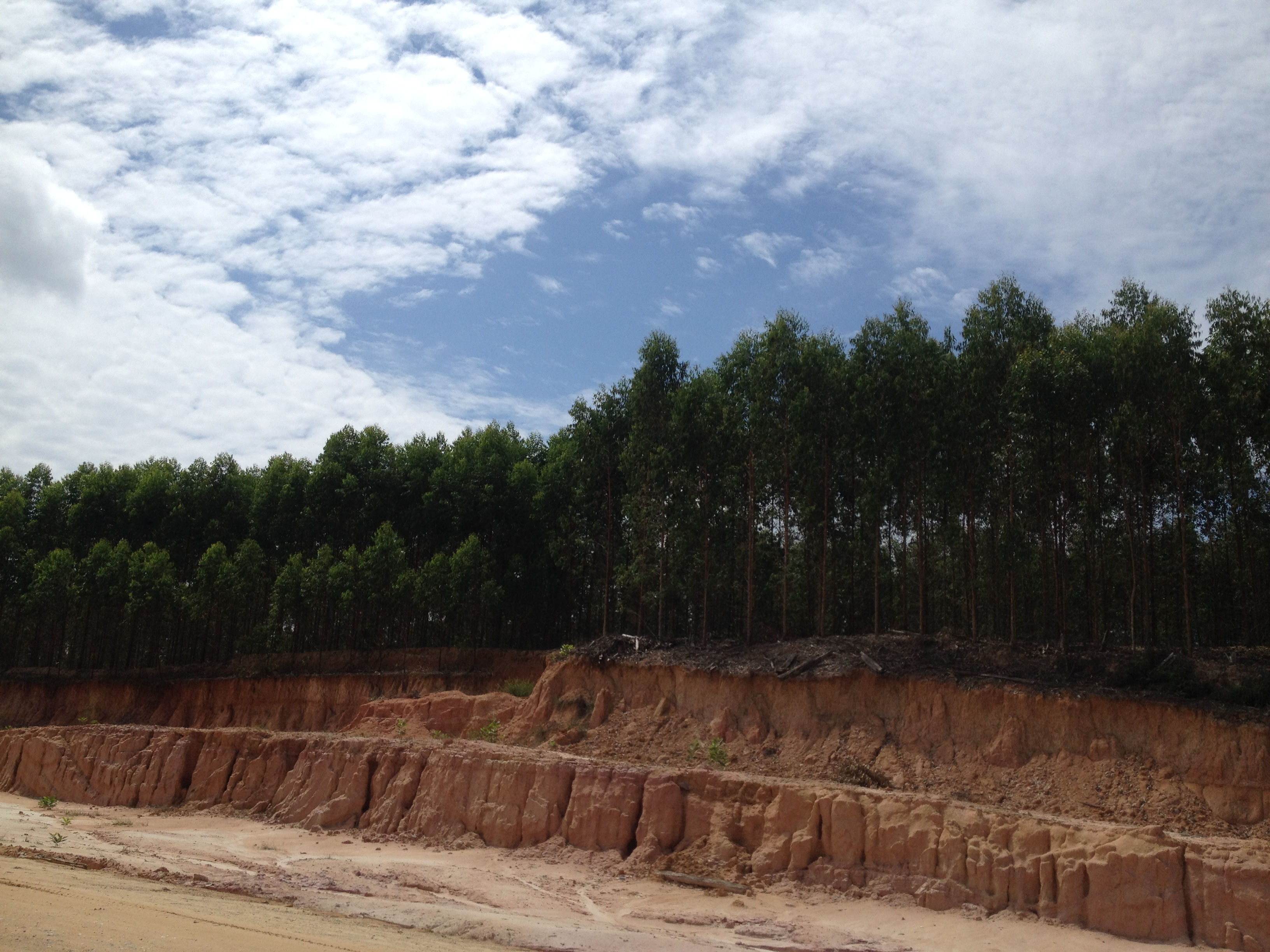 HTI Terletak di Kabupaten Bengkalis, Kecamatan Pinggir dikelola oleh PT. Arara Abadi group Sinar Mas